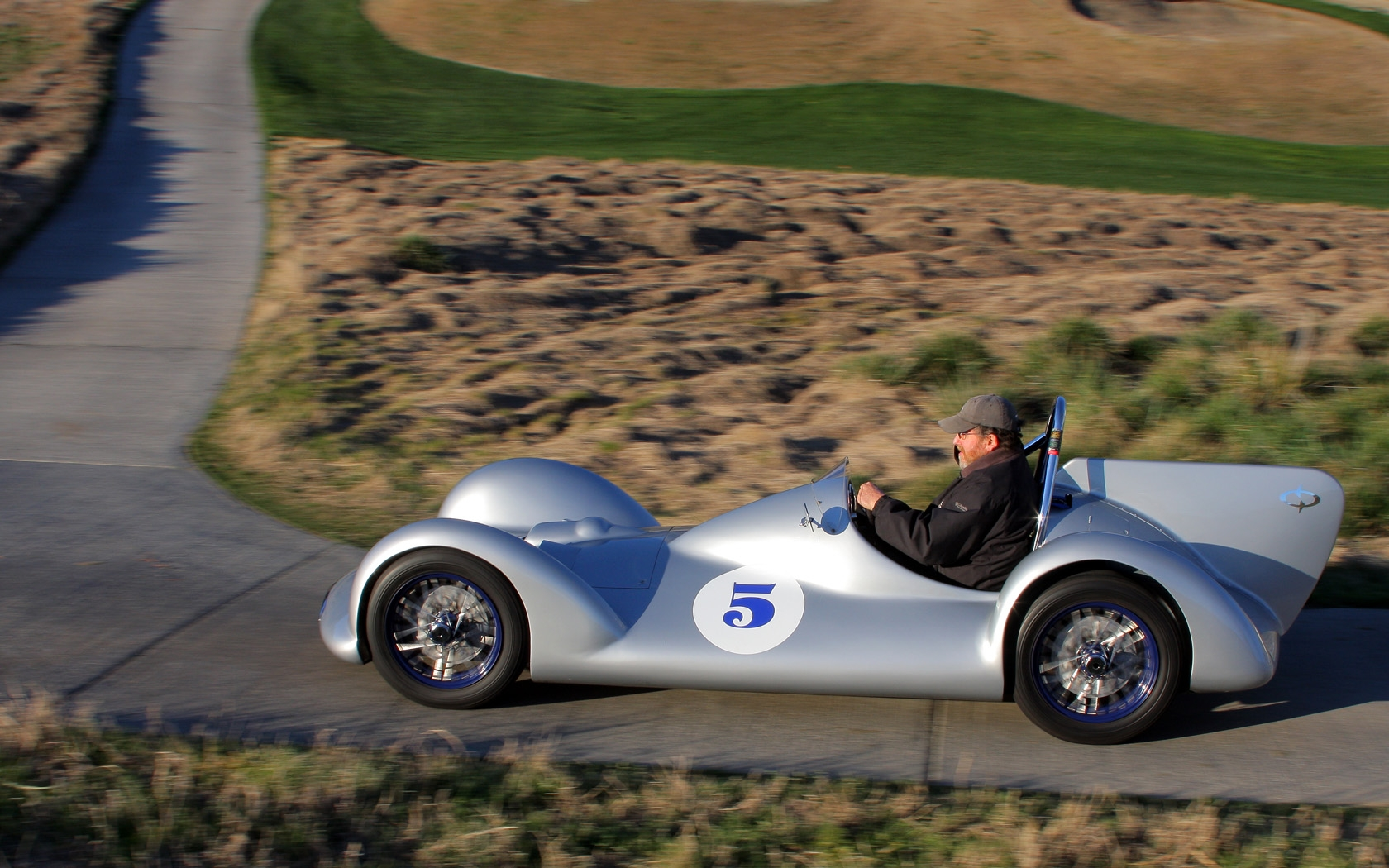 2011 Desert Classic, La Quinta, CA